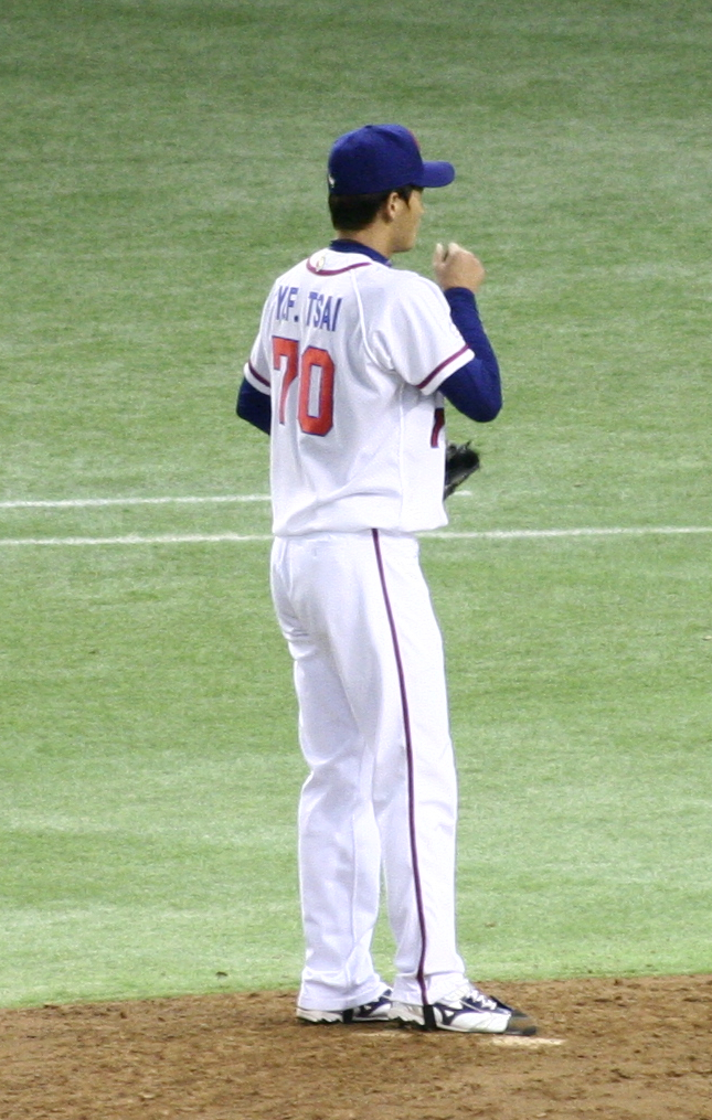 蔡英峰